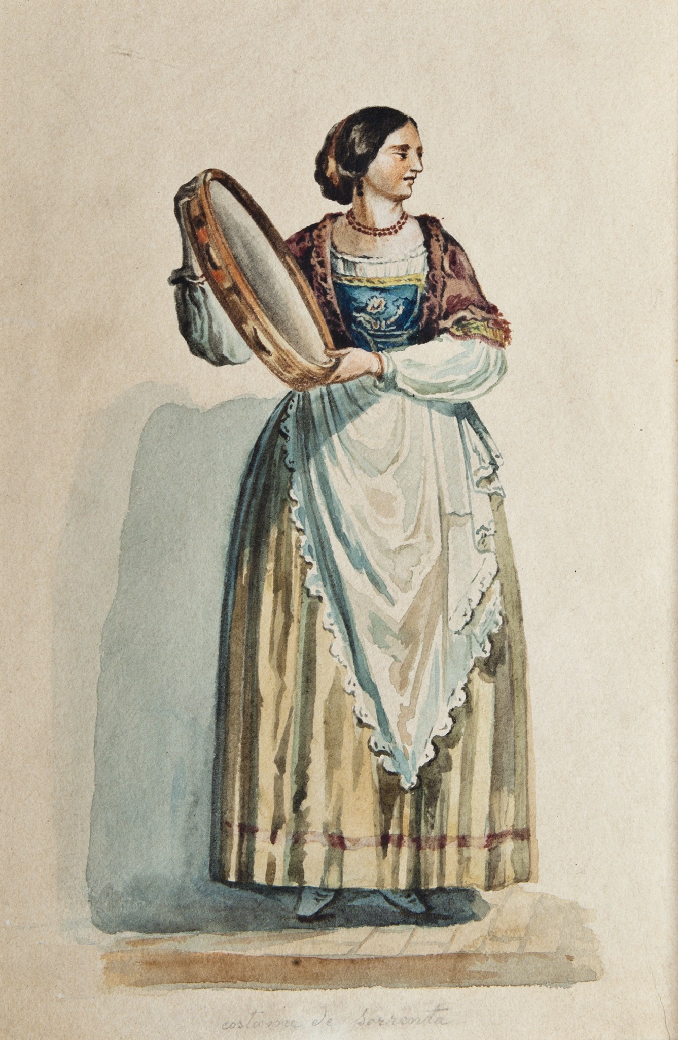 Costum italian din Sorrento, acuarelă/carton subtire, nesemnat, nedatat, inscriptie, jos, centru, in creion negru, inv. 192, 0,23x0,16m, Muzeul Municipiului Bucuresti - Muzeul Gheorghe Tattarescu